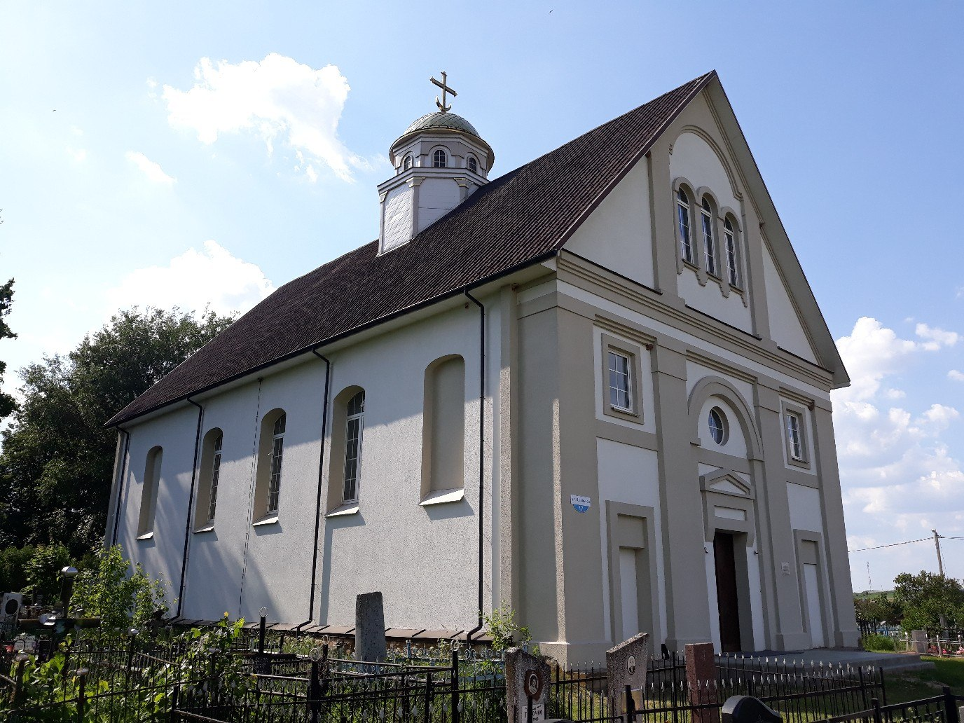 Царква Раства Багародзіцы